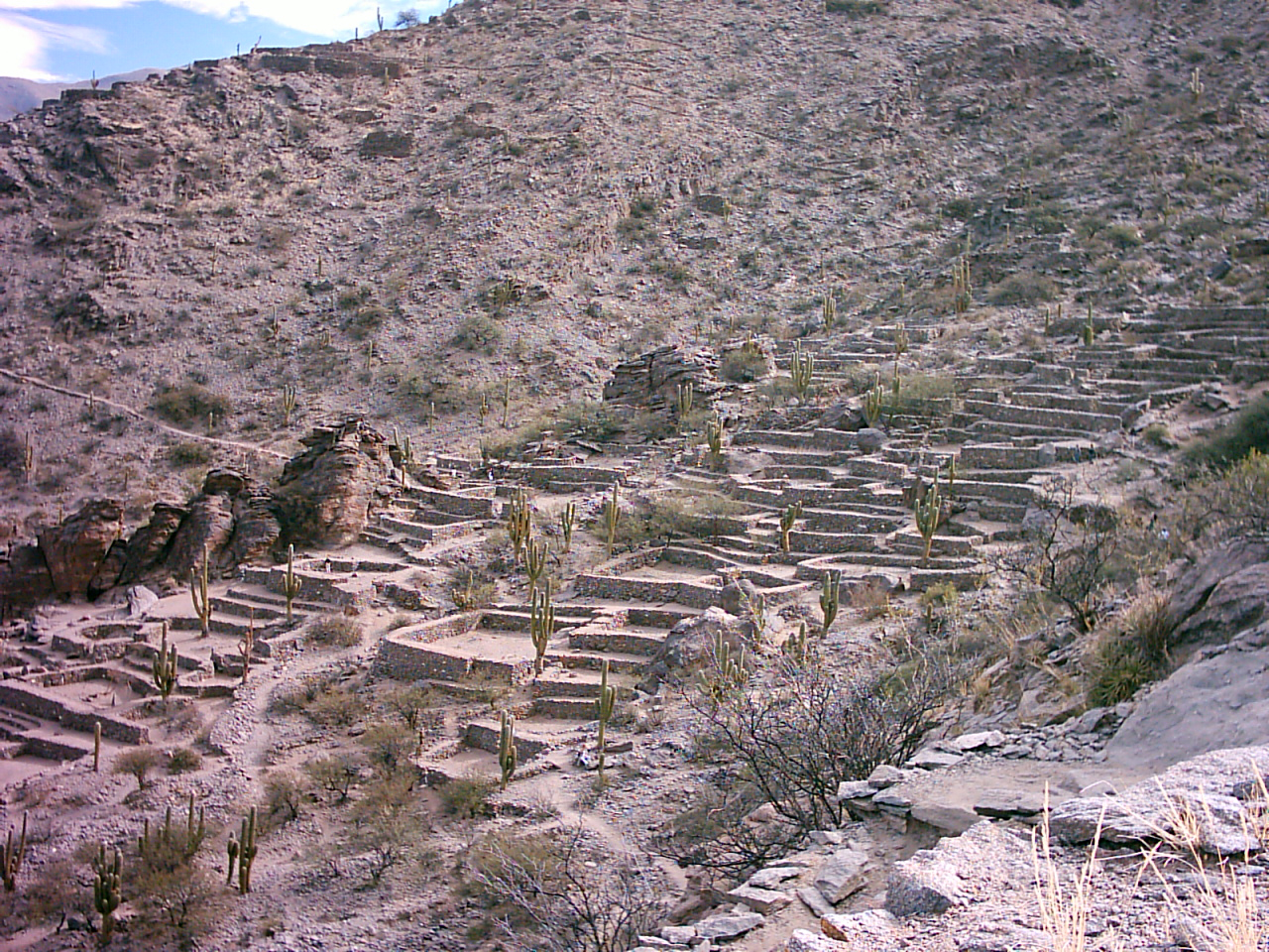 Ruinas quilmes